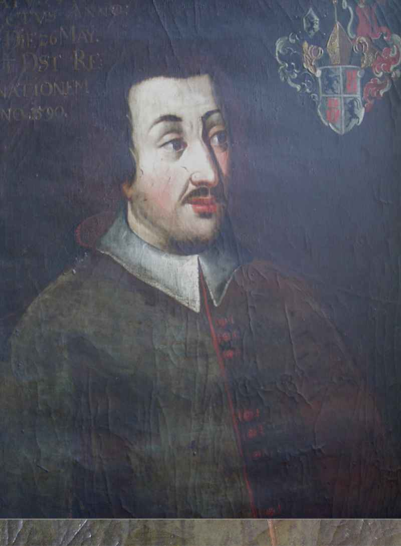 Beata à Porta (1530-1590) Fürstbischof von Chur 1565-1581. Porträt im Rittersaal des Bischöflichen Schlosses, Chur